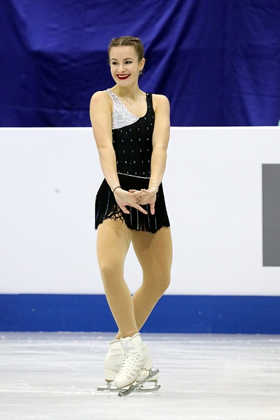 Кристен Спурс (Великобритания) на чемпионате мира среди юниоров 2017